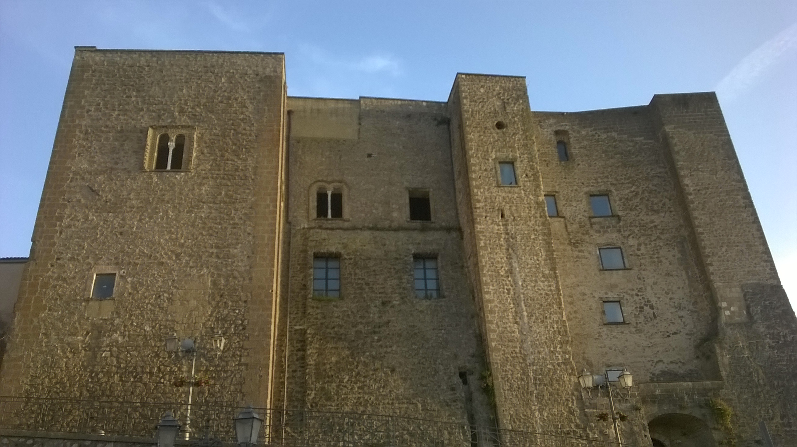 Castello di Sessa Aurunca (X secolo)